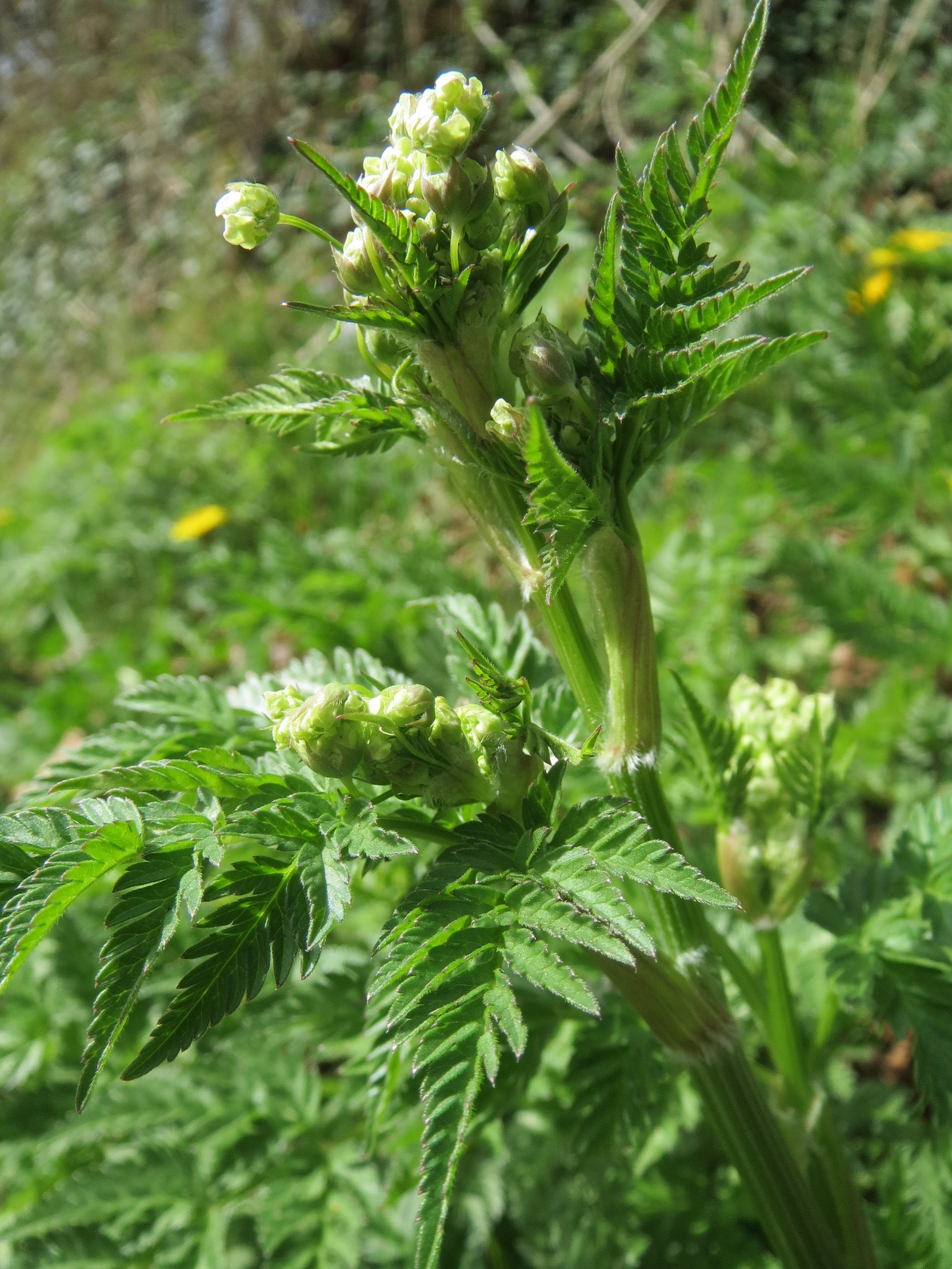 Echter Kerbel (Anthriscus cerefolium) im Simbachtal